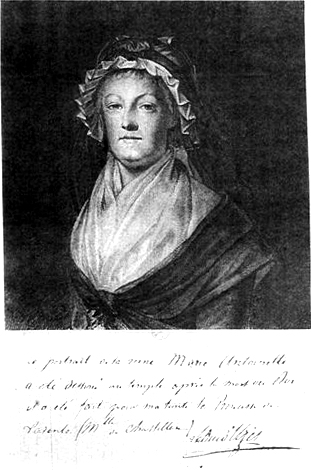 Pastel Marie-Antoinette